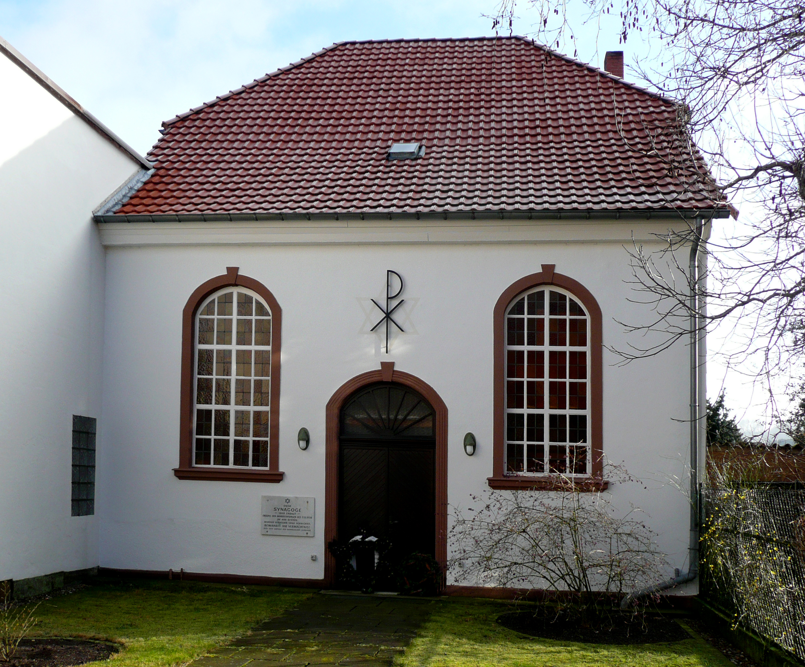 Ehemalige Synagoge in Dransfeld, Südniedersachsen. Ansicht von W. Der straßenseitig verputzte Fachwerkbau von 1810 wurde während der Novemberpogrome 1938 von SA-Angehörigen aus Hann. Münden verwüstet. This is a photograph of an architectural monument.It is on the list of cultural monuments of Niedersachsen